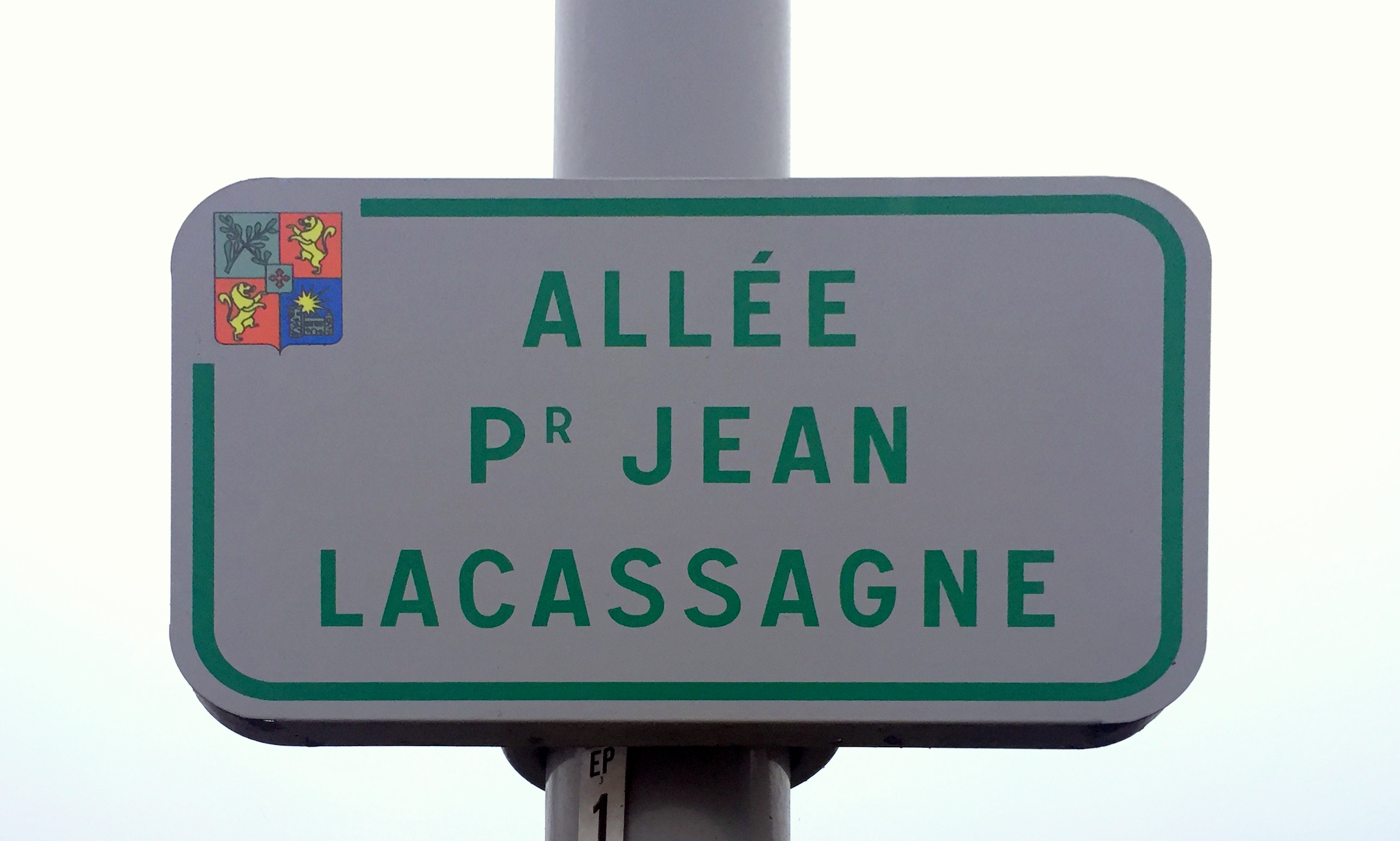 Allée Jean-Lacassagne à Beynost.